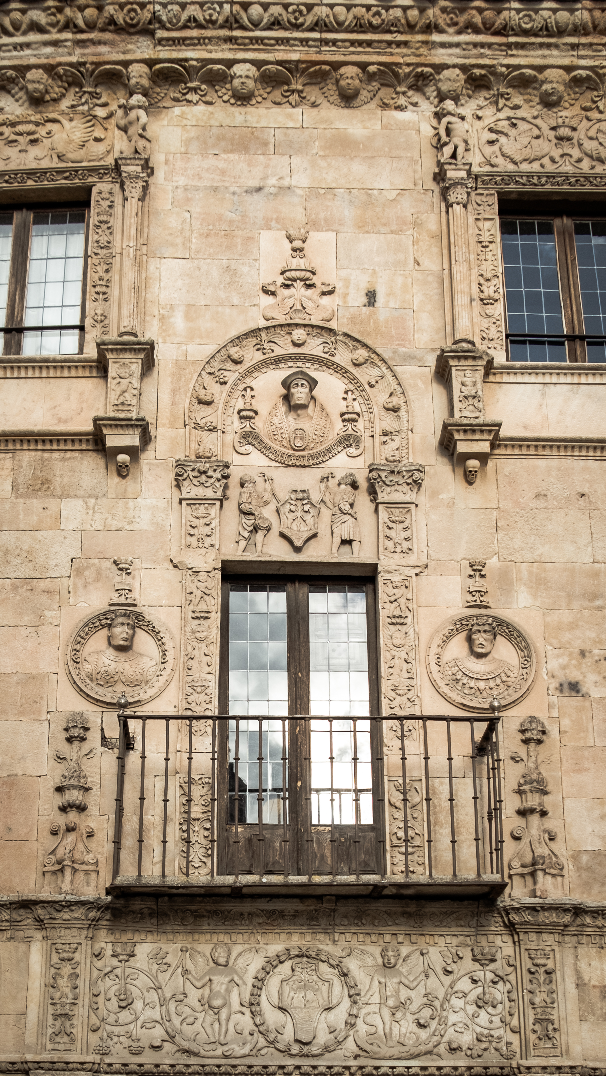 Esta vivienda fue diseñada por el arquitecto Juan de Álava en el año 1500 para el arzobispo Alonso de Fonseca y Ulloa y se conoció posteriormente como "Casa de las Muertes" por una serie de asesinatos que allí acontecieron. Está en la calle Bordadores de Salamanca y bajo el relieve de Fonseca se puede leer "Severissimo Fonseca Patriarcha Alexandrino".